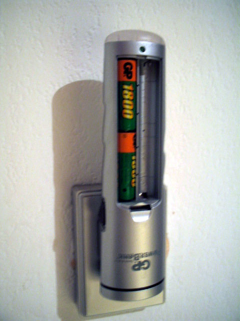 Oplaadbare batterijoplader in stopcontact